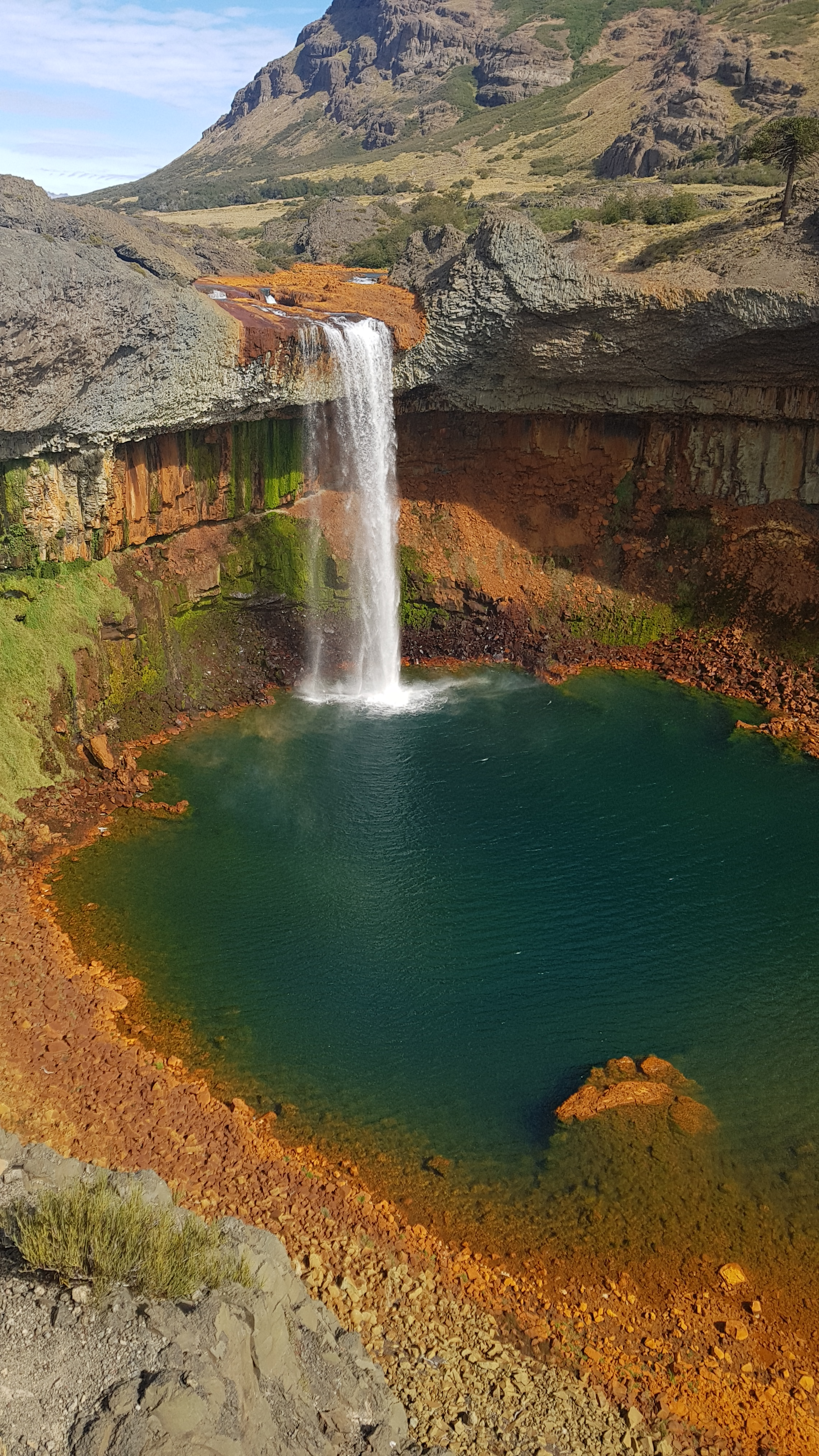 Imponente salto de agua de 60 metros de altura, ubicado a 10 km de Caviahue, por la Ruta provincial 27, en la provincia de Neuquén (Argentina).